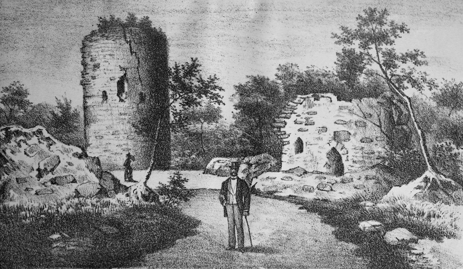 Zeichnung der Ebersburg (Harz)